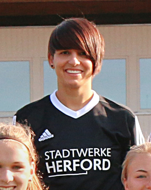 Herforder SV Borussia Friedenstal Team 2014/2015